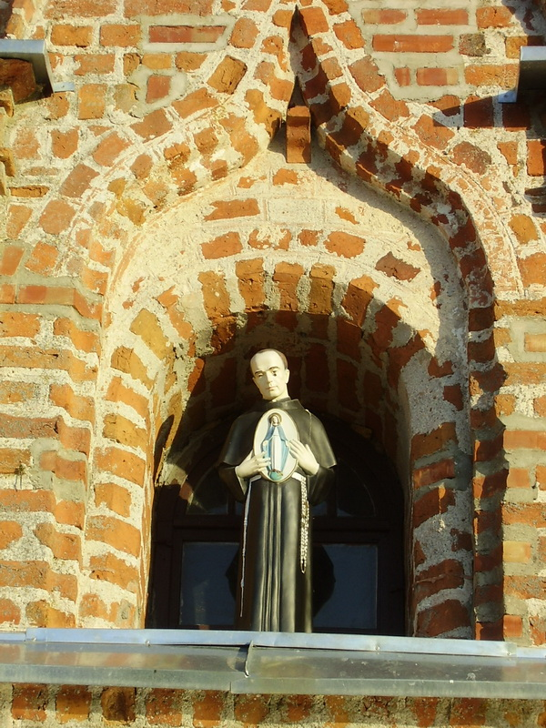 Гнезна. Акно касцёла